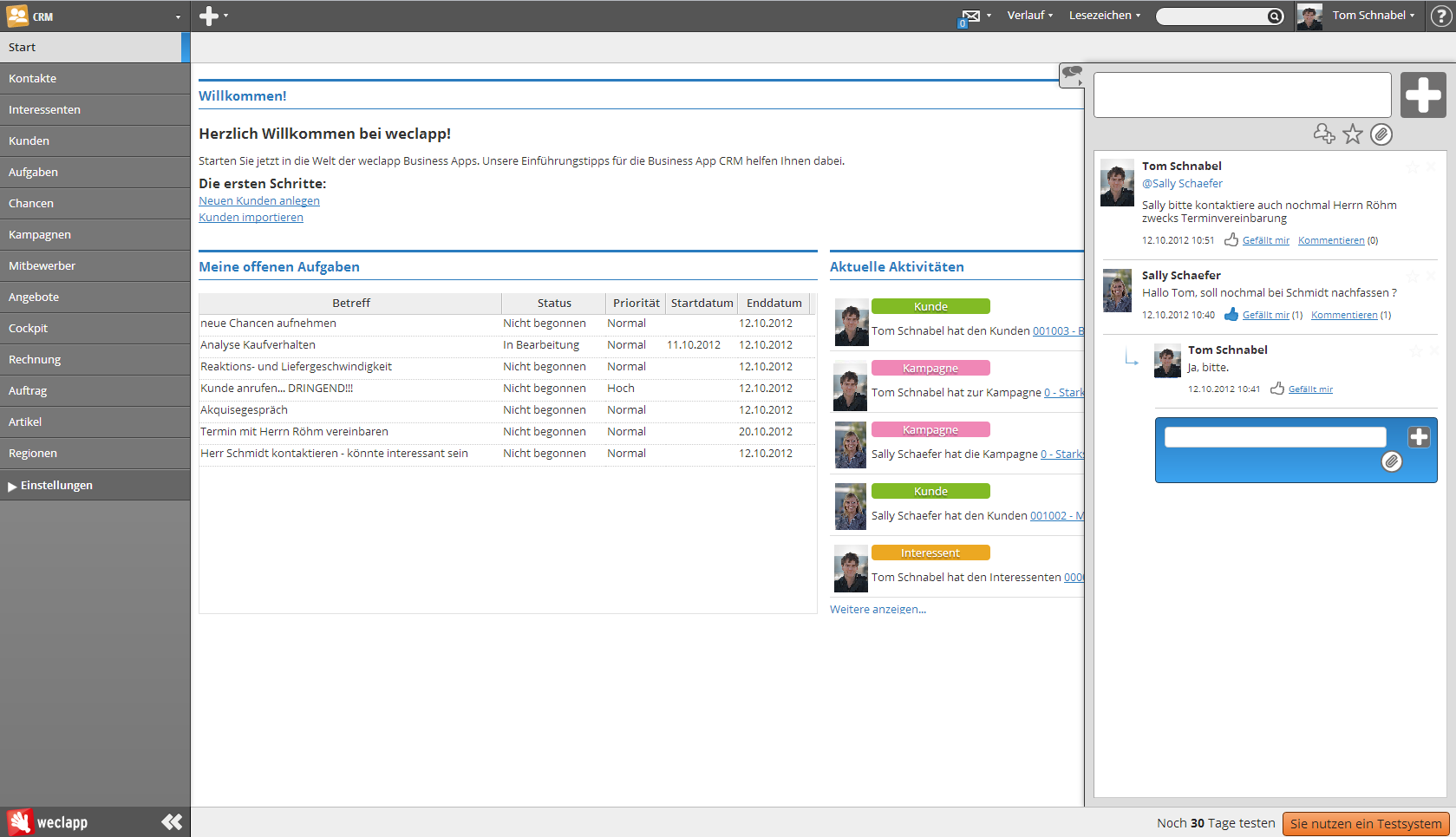 Screenshot der browserbasierten, SaaS (Software as a Service) CRM-Anwendung mit Activity Stream, ein Social Collaboration Tool.